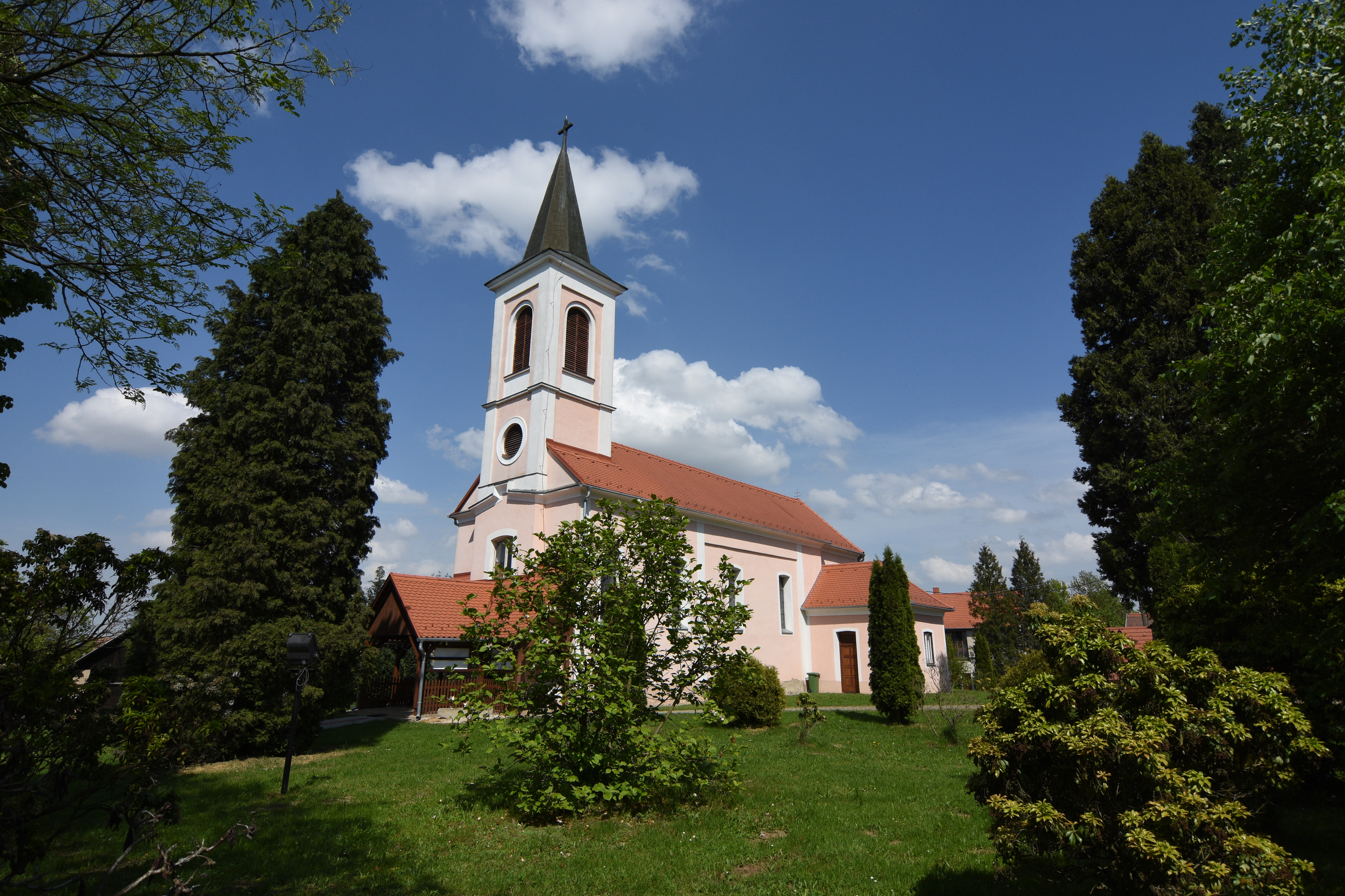 Felsomarác templom